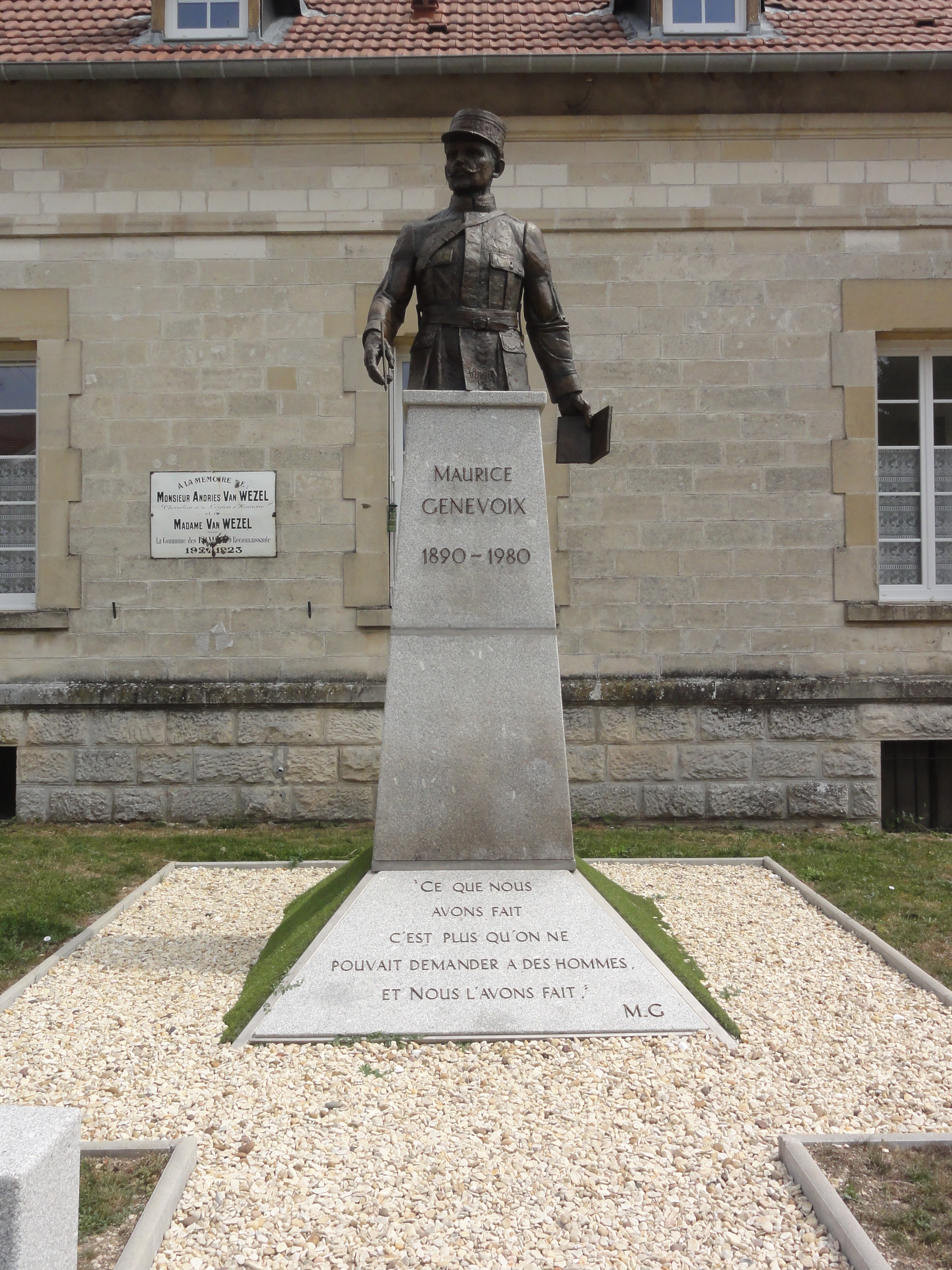 Les Éparges (Meuse) Statue-buste Maurice Génevoix